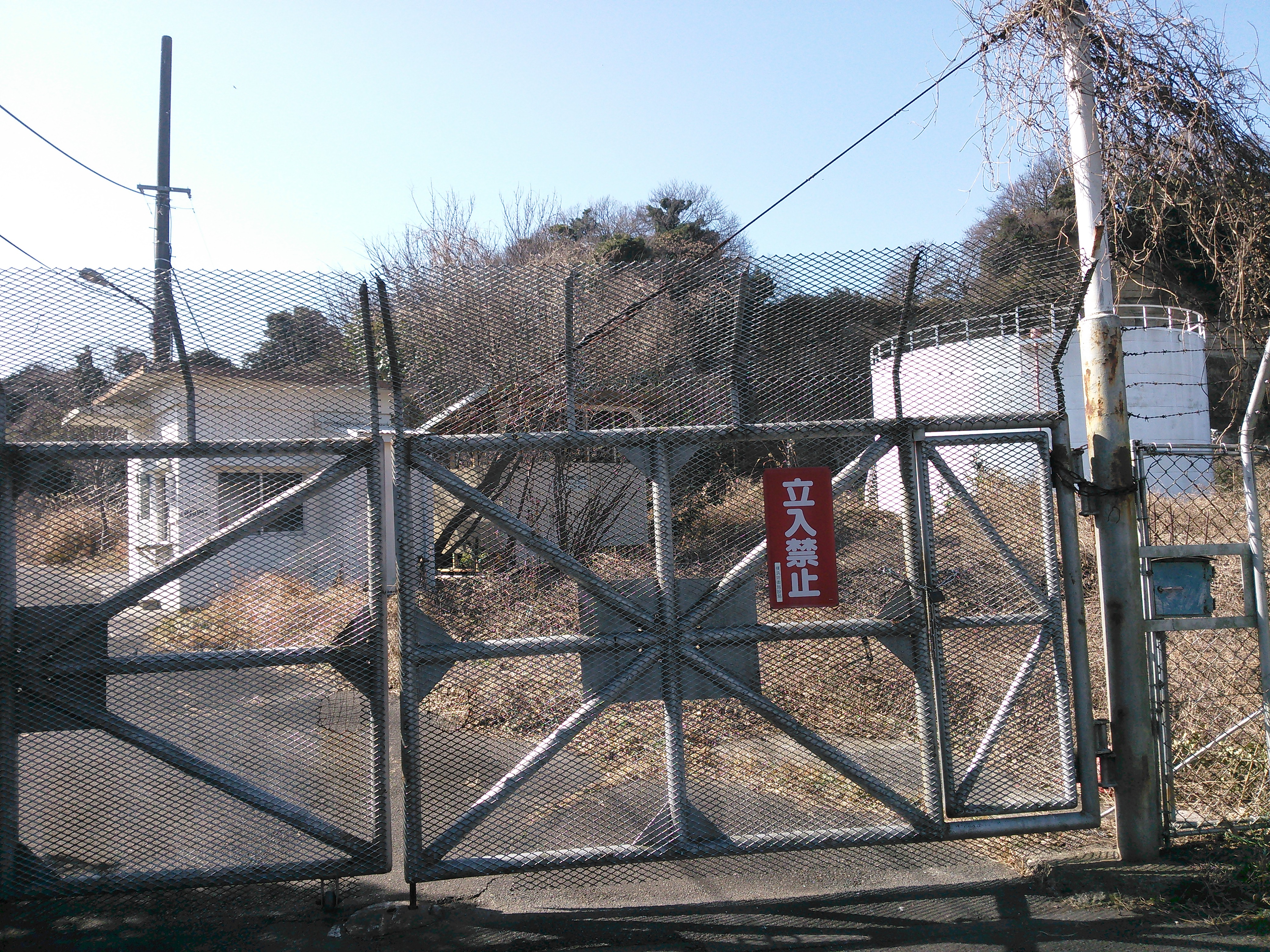 横浜市金沢区、小柴貯油施設 並木側ゲート。公道より撮影。